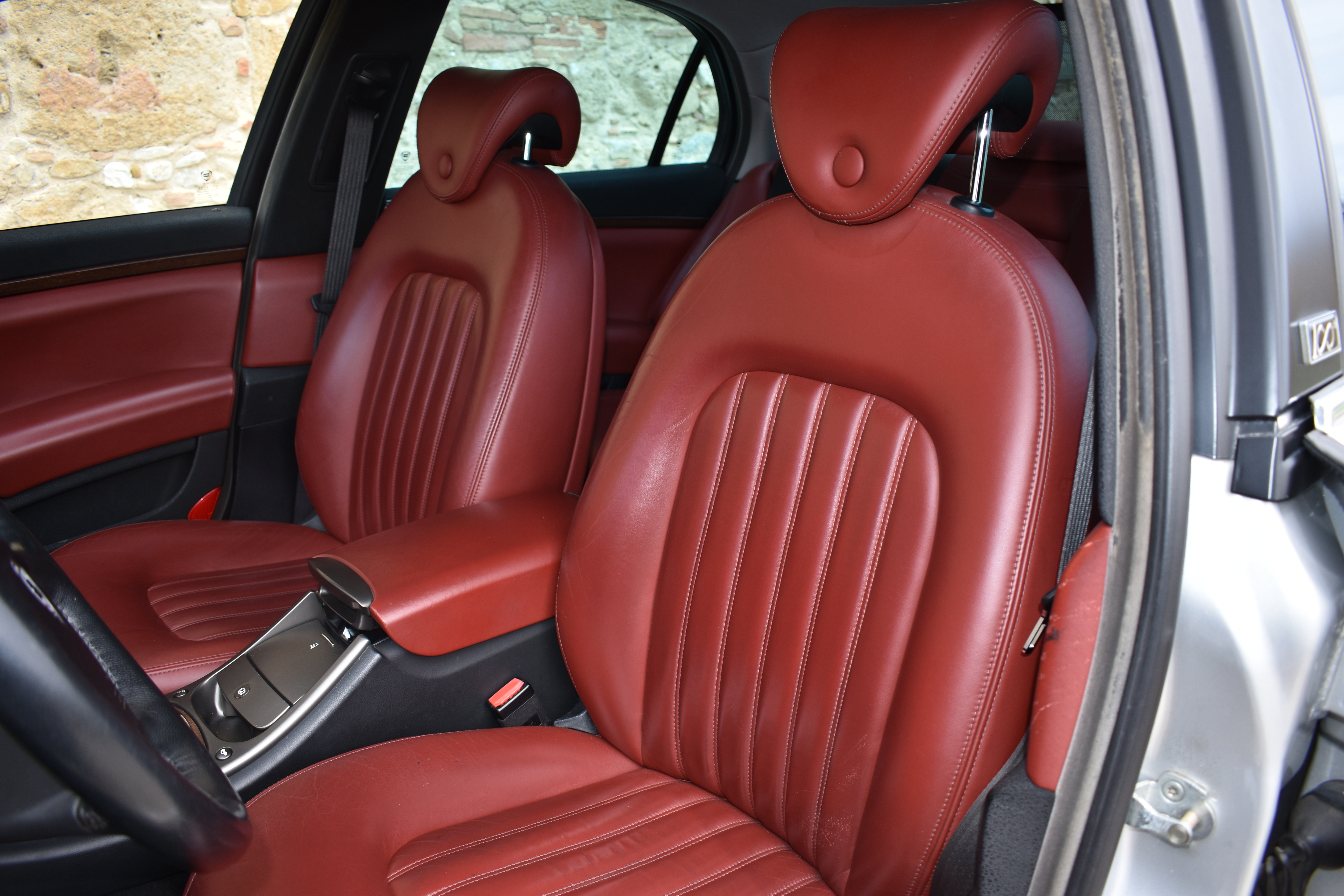 Allestimento interno in Pelle Frau disponibile su Thesis Centenario